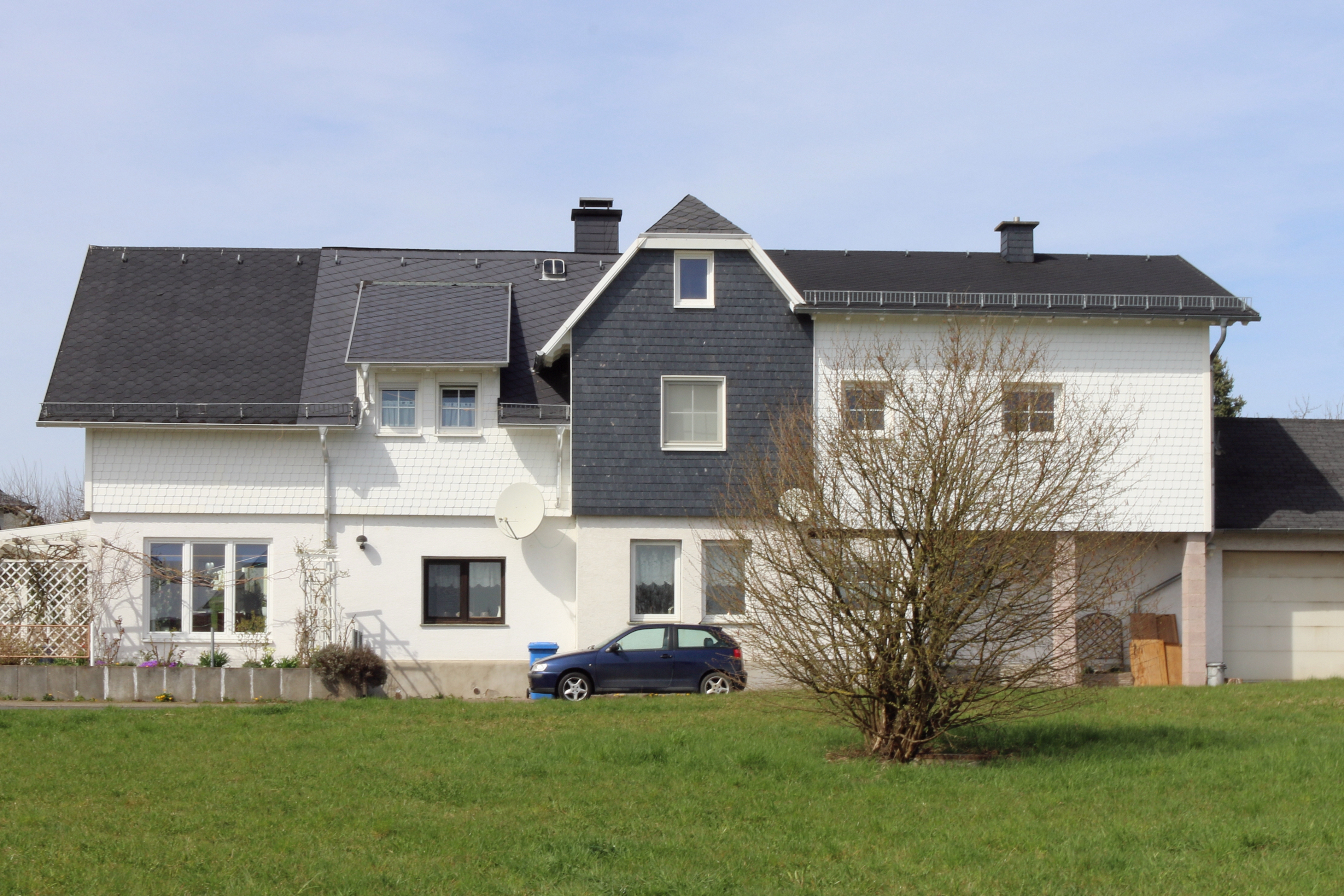 Waldbrunn (Westerwald) - Fussingen: Ehemaliger Bahnhof der Kerkerbachbahn